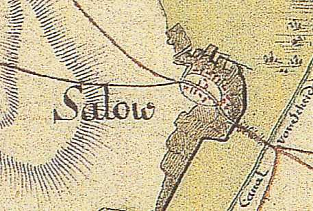 Karte von Saalow (Ortsteil der Gem. Am Mellensee, Brandenburg, Deutschland), aus den Jahren 1767 bis 1787, Land Brandenburg, Deutschland